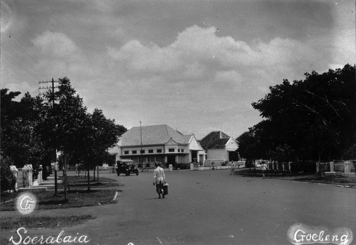 Foto. Straatbeeld in de wijk Goebeng, Soerabaja, Oost-Java.